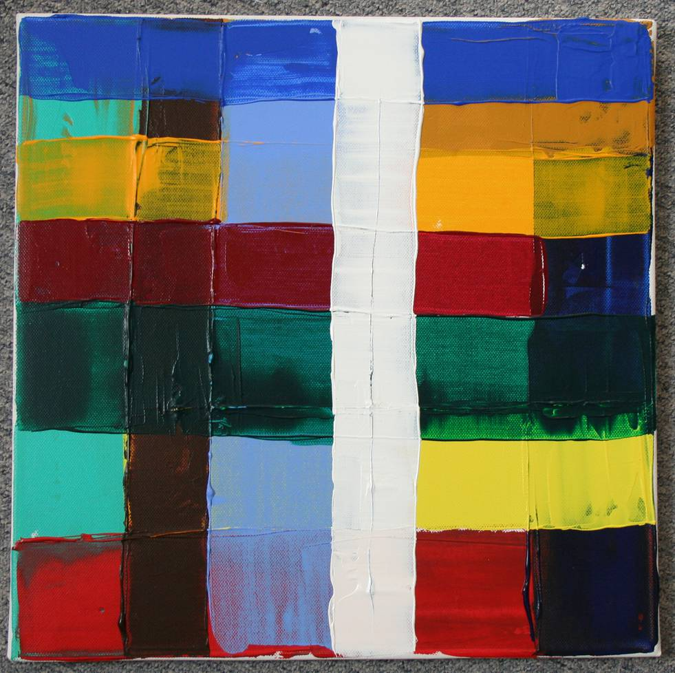 Farbfeldmalerei